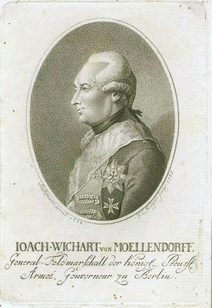 Wichard von Möllendorf (1724-1816), preußischer Generalfeldmarschall